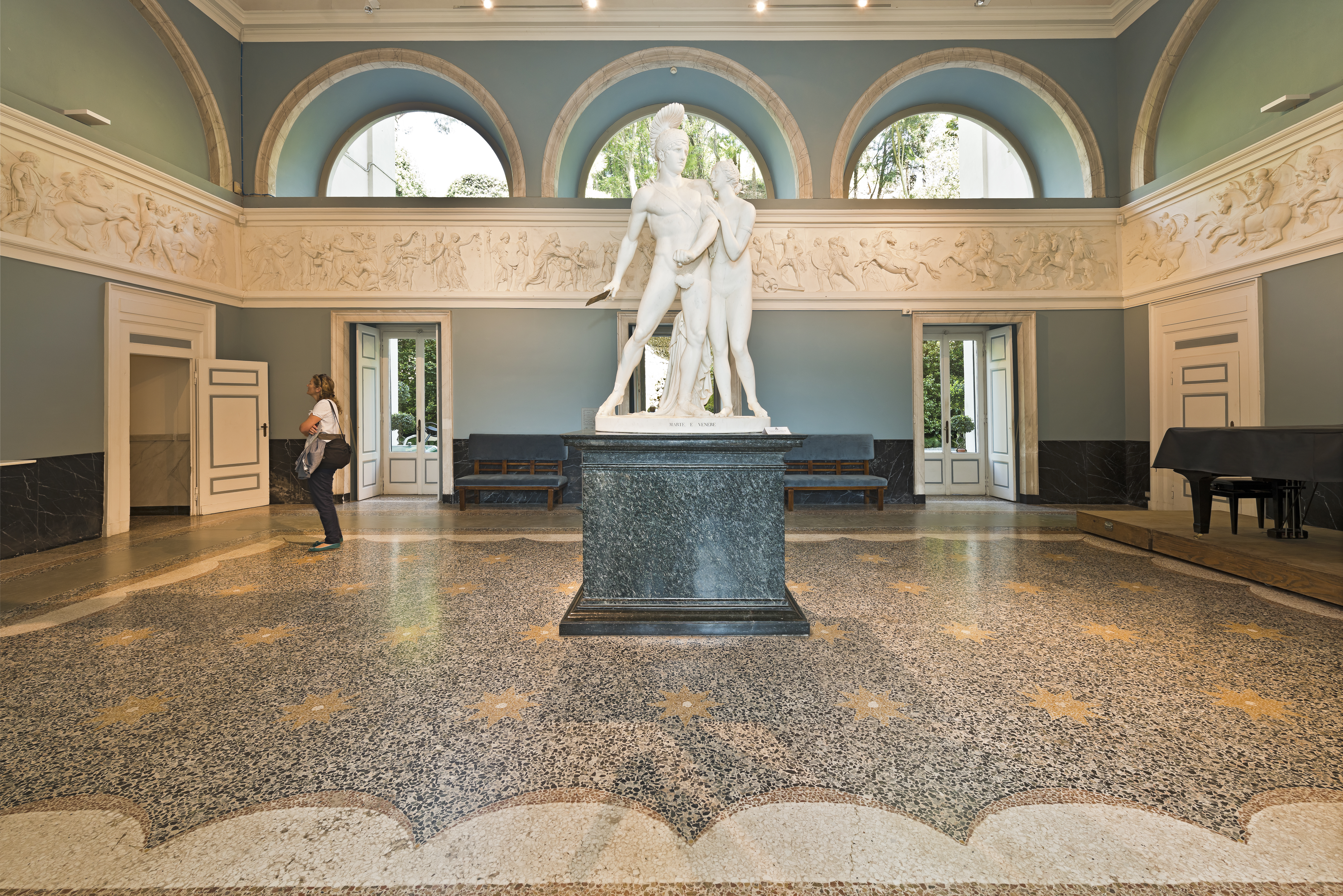 Villa Carlotta - museo e giardino botanico This is a photo of a monument which is part of cultural heritage of Italy.